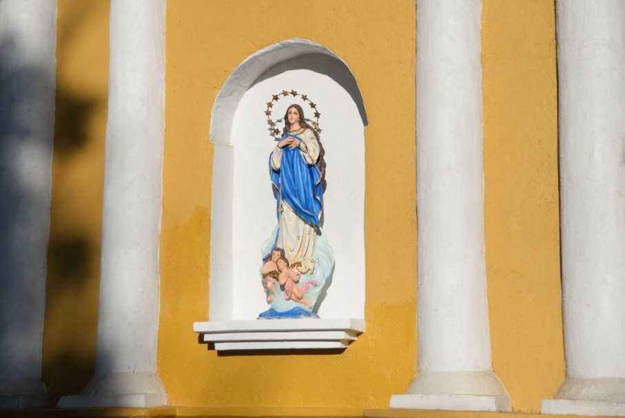 Estatua de la iglesia de Tisma